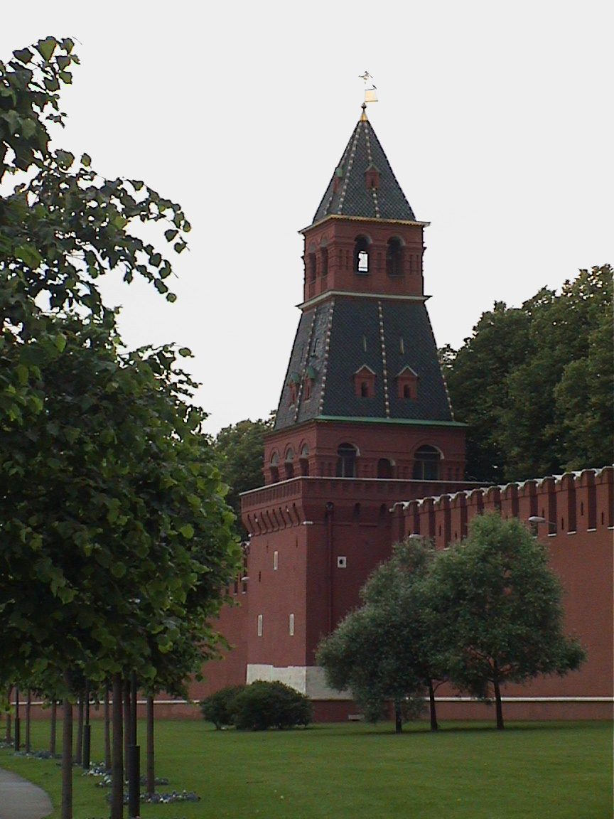 Tour du secret (Kremlin de Moscou)